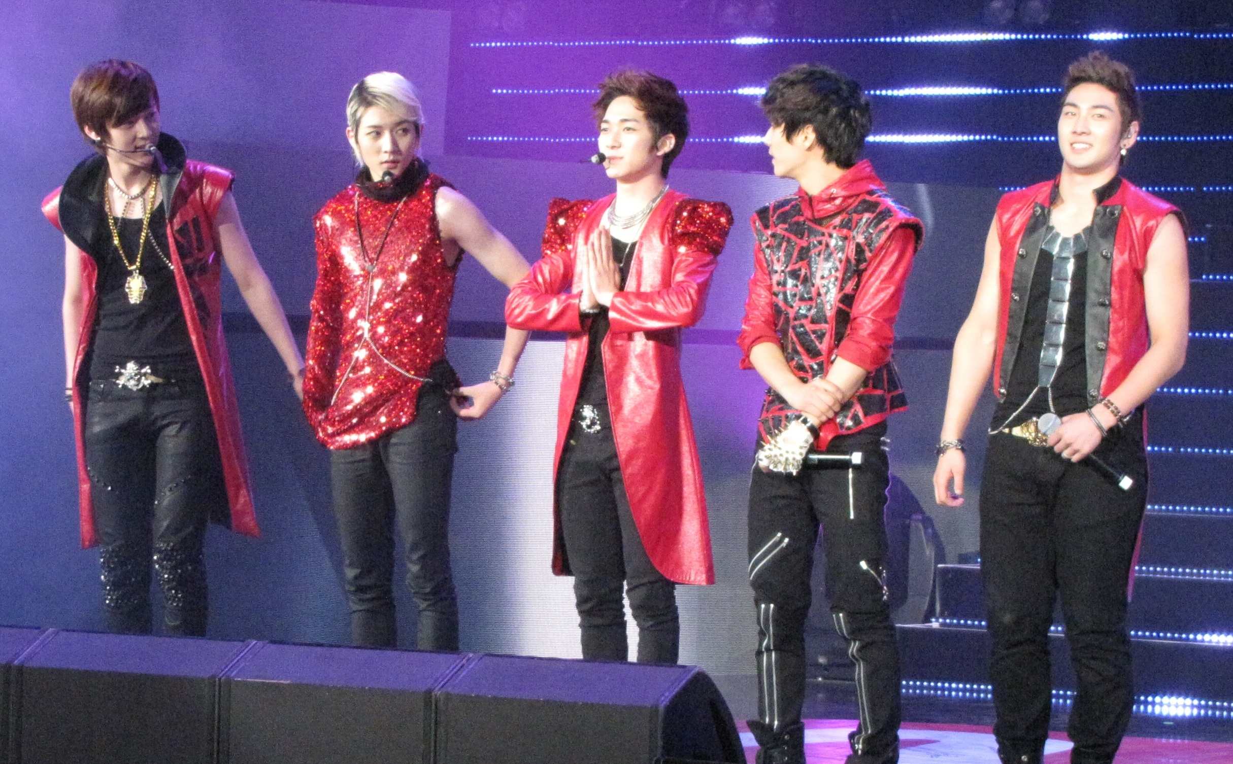 Nuest_2014.jpg